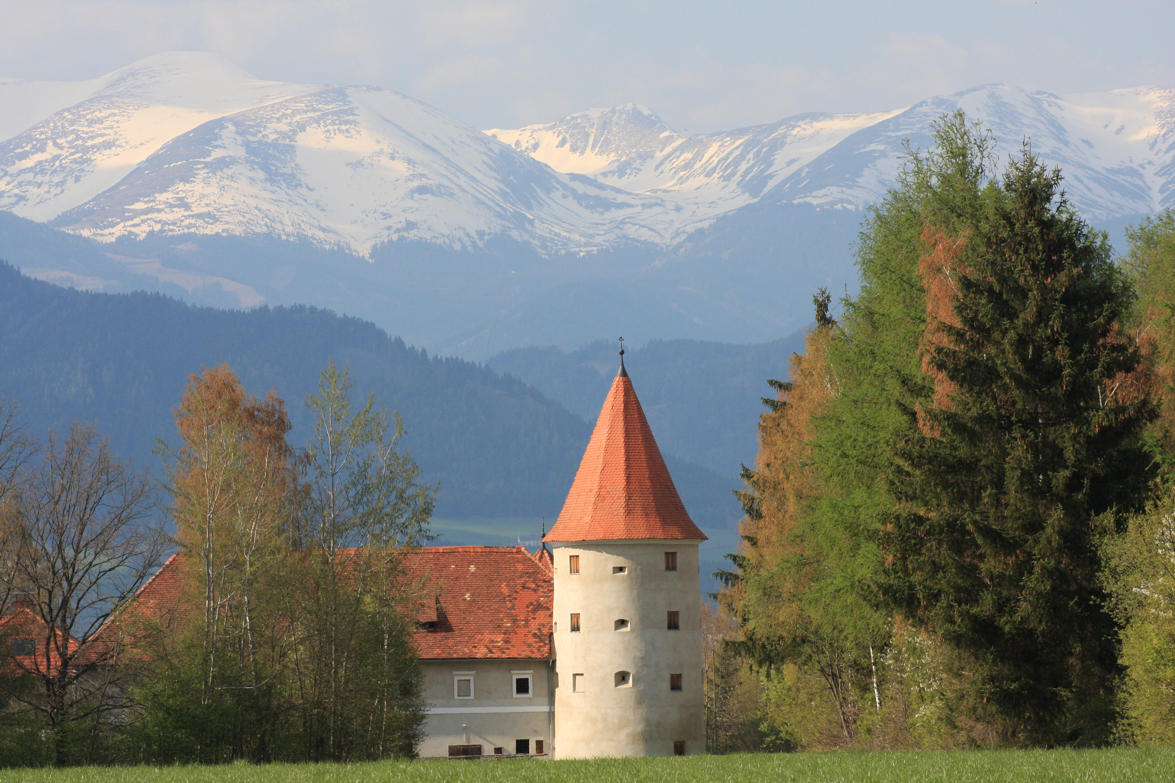 Schloss Thann